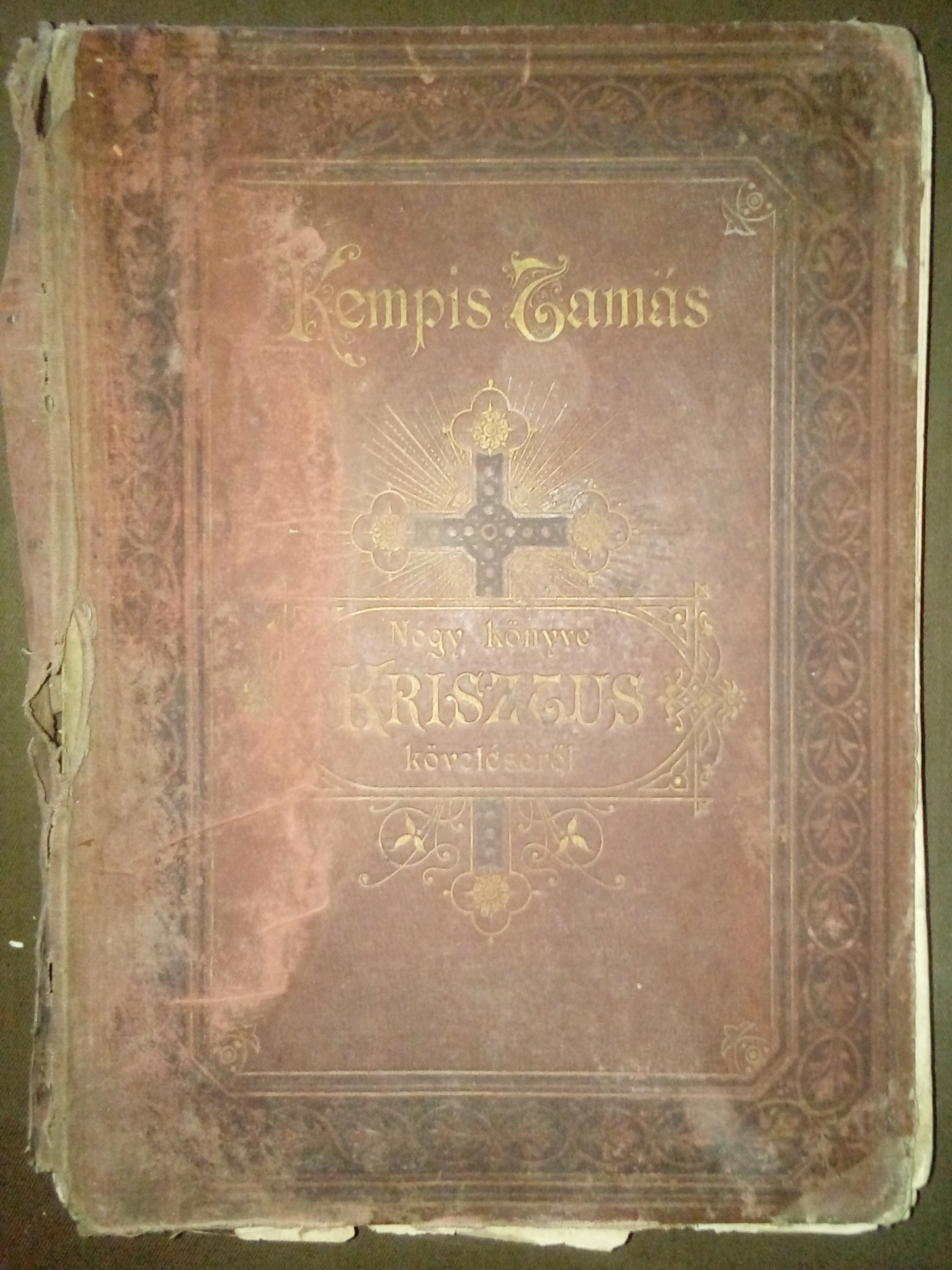 Az adott mű borítója.